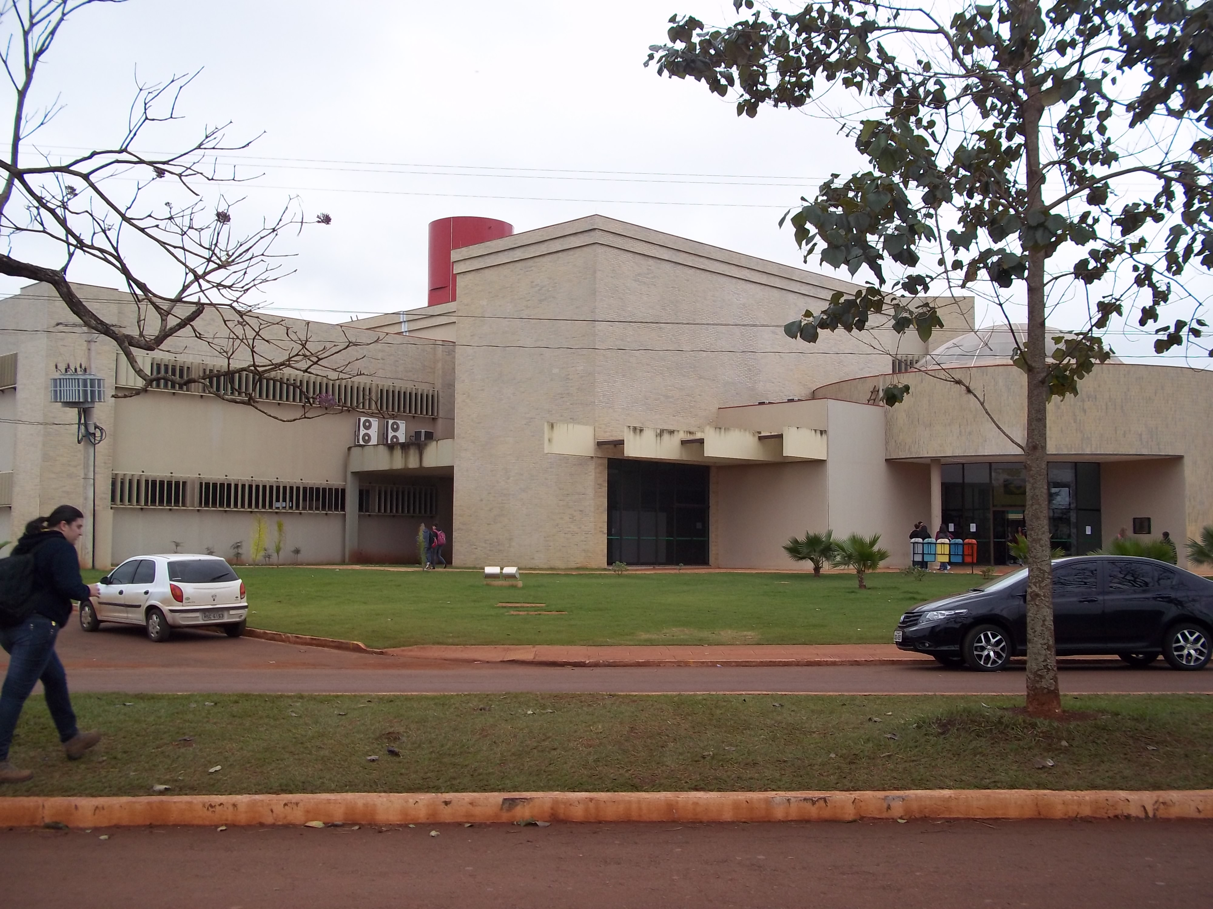 Biblioteca Central da cidade universitária de Dourados, MS